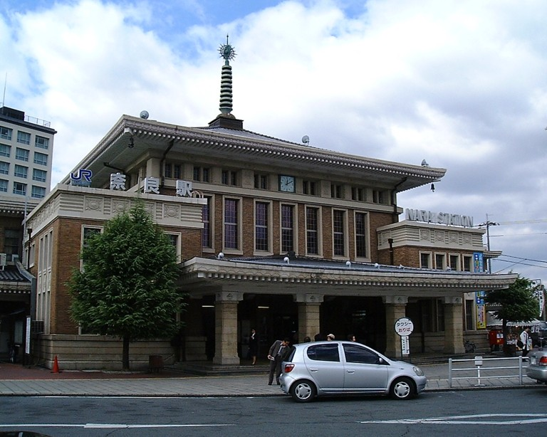 JR奈良駅 旧駅舎